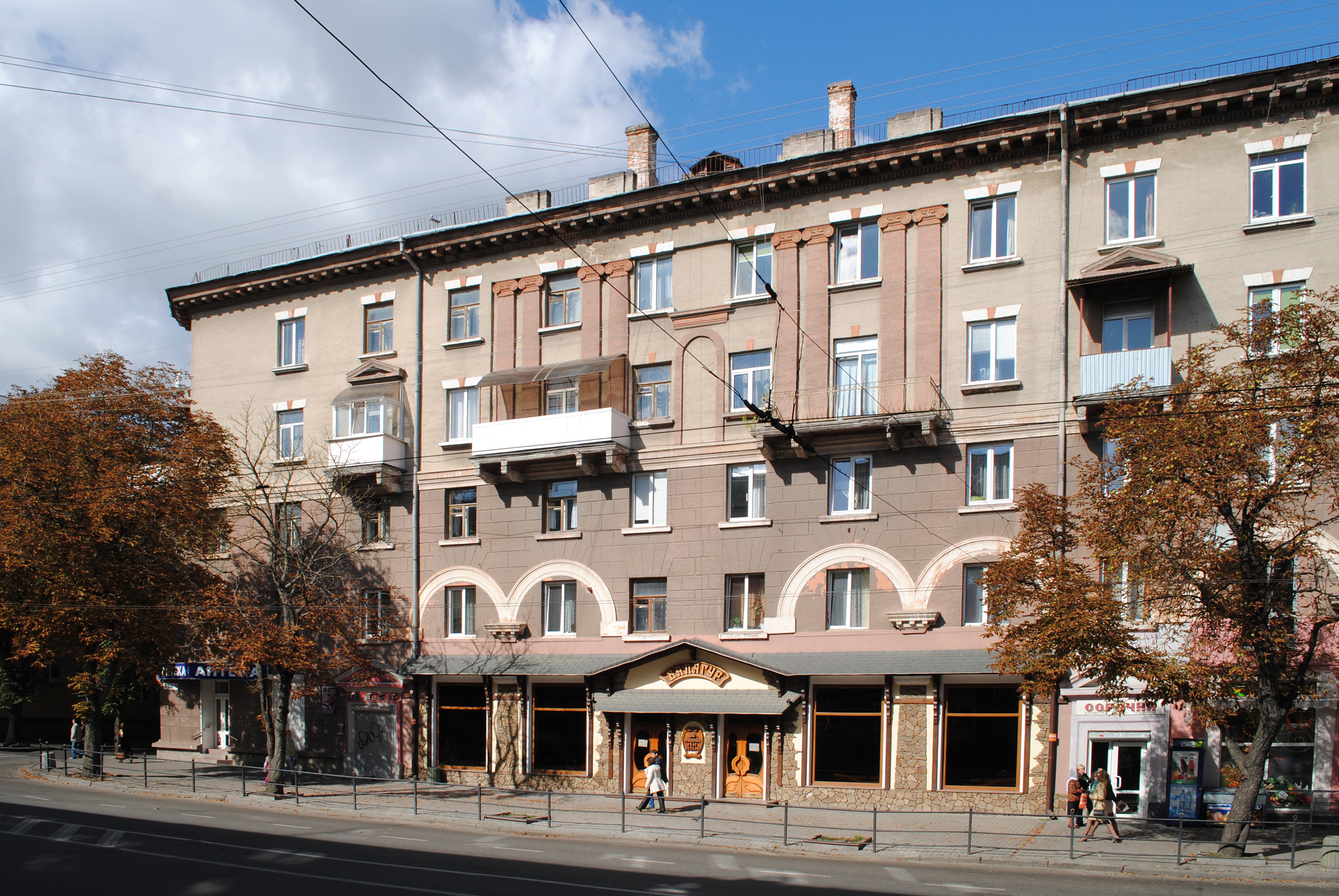 Житлово-торгівельний будинок (мурований) на вул. Руській, 19 в Тернополі.